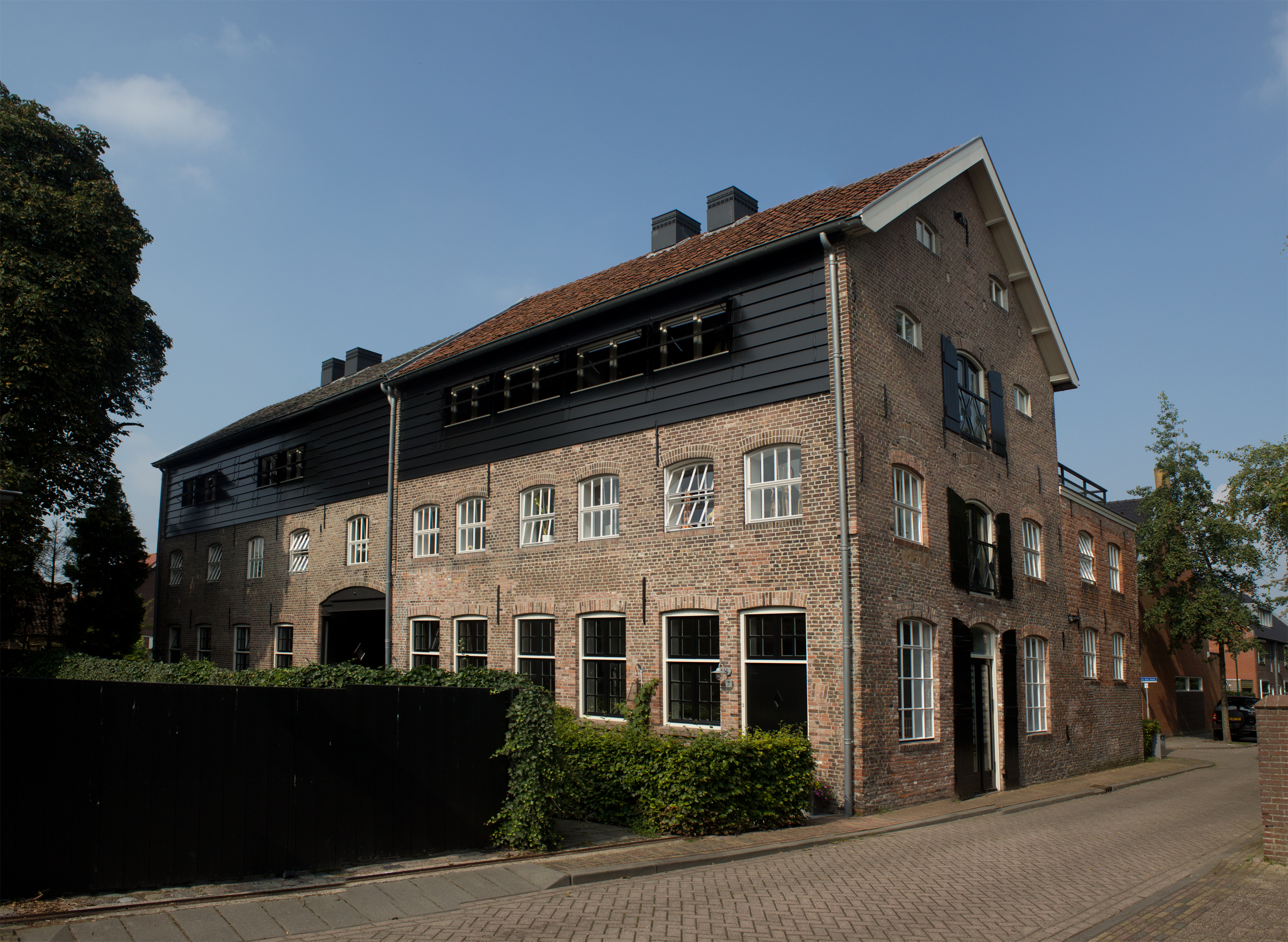 Dongen - Looierij